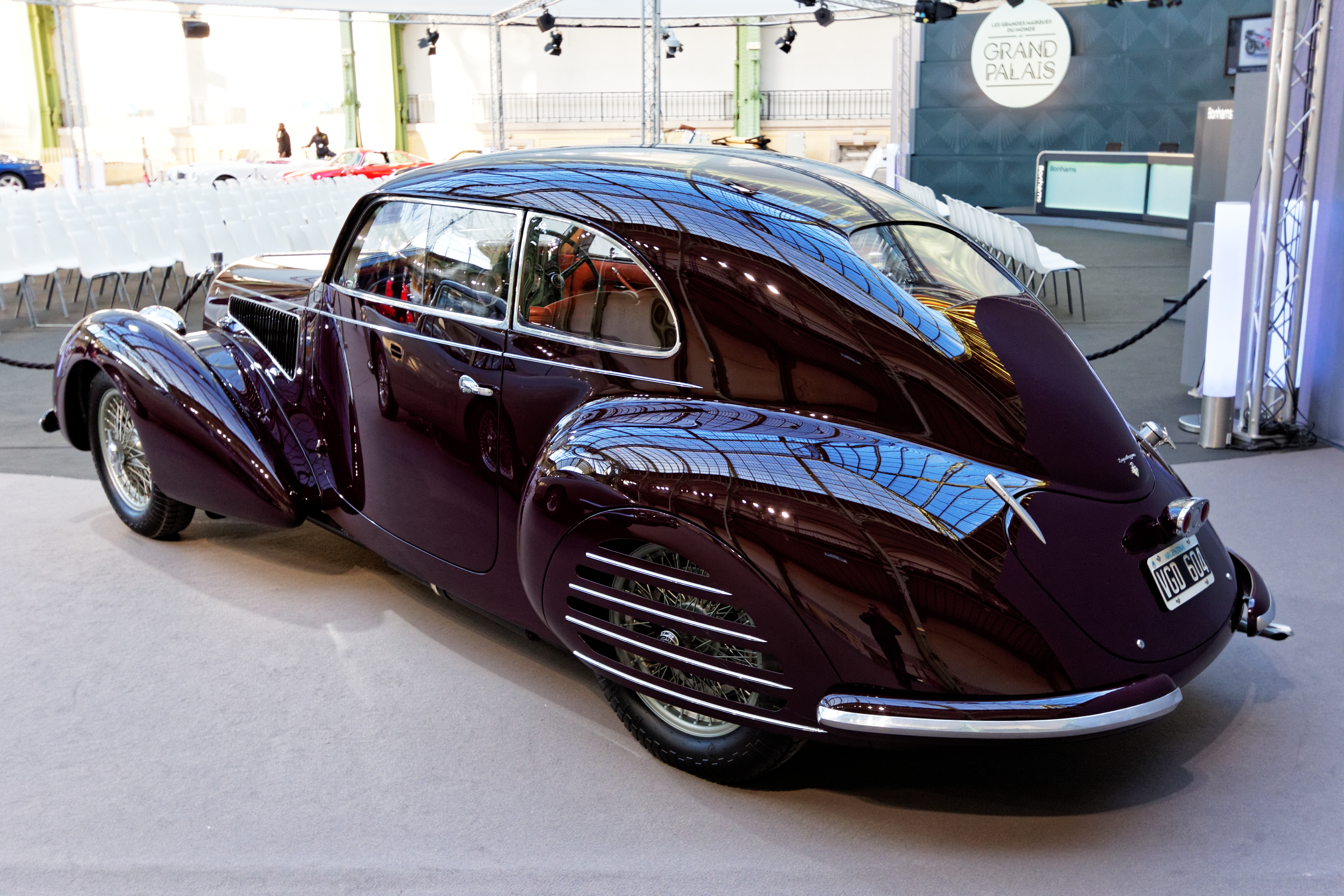 Un des véhicules présenté lors de la vente aux enchères Bonhams 2016 au Grand Palais de Paris.